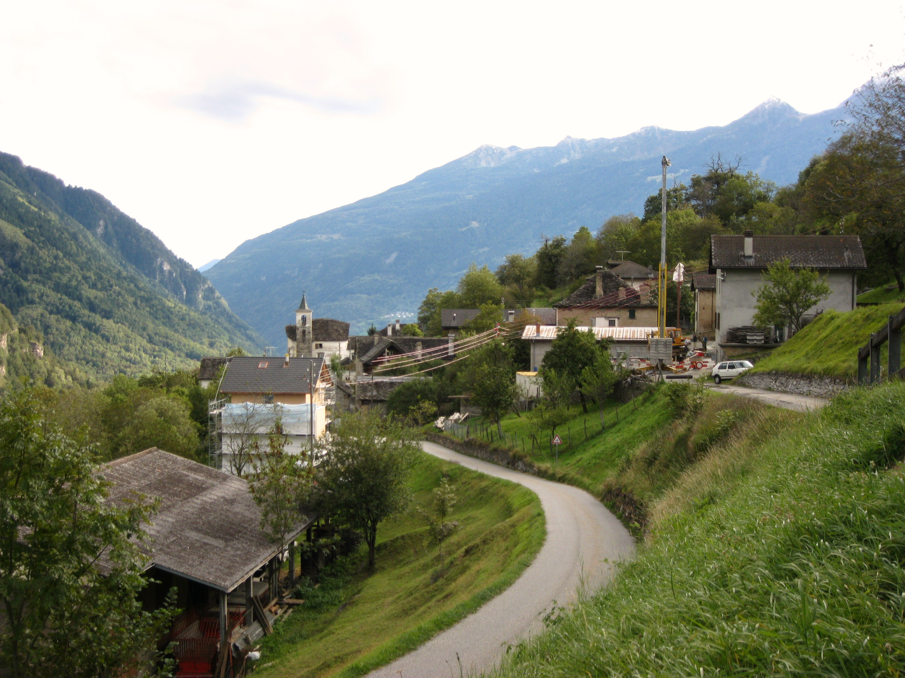 Largario, fraz. di Acquarossa